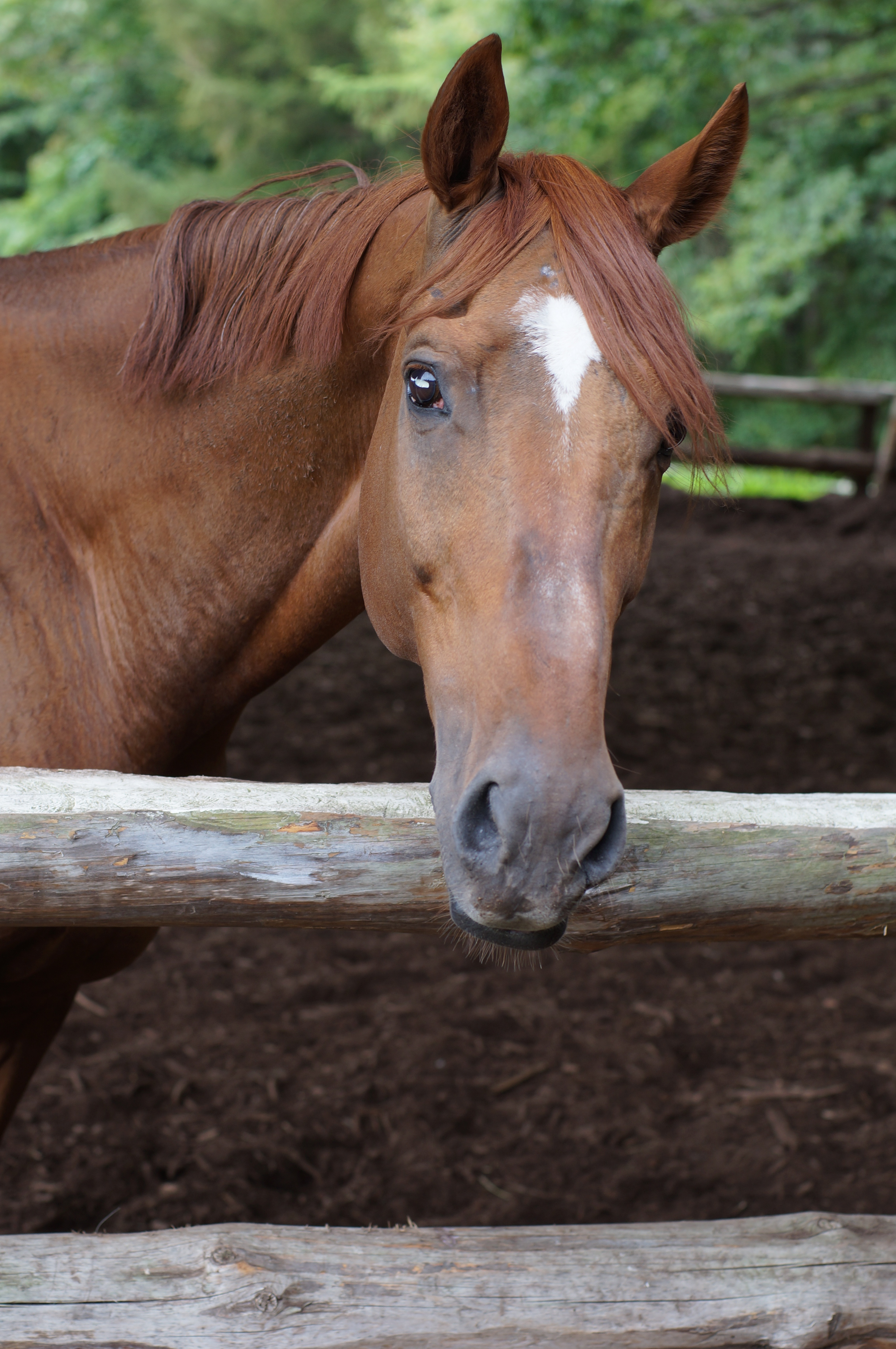 小須田牧場にて